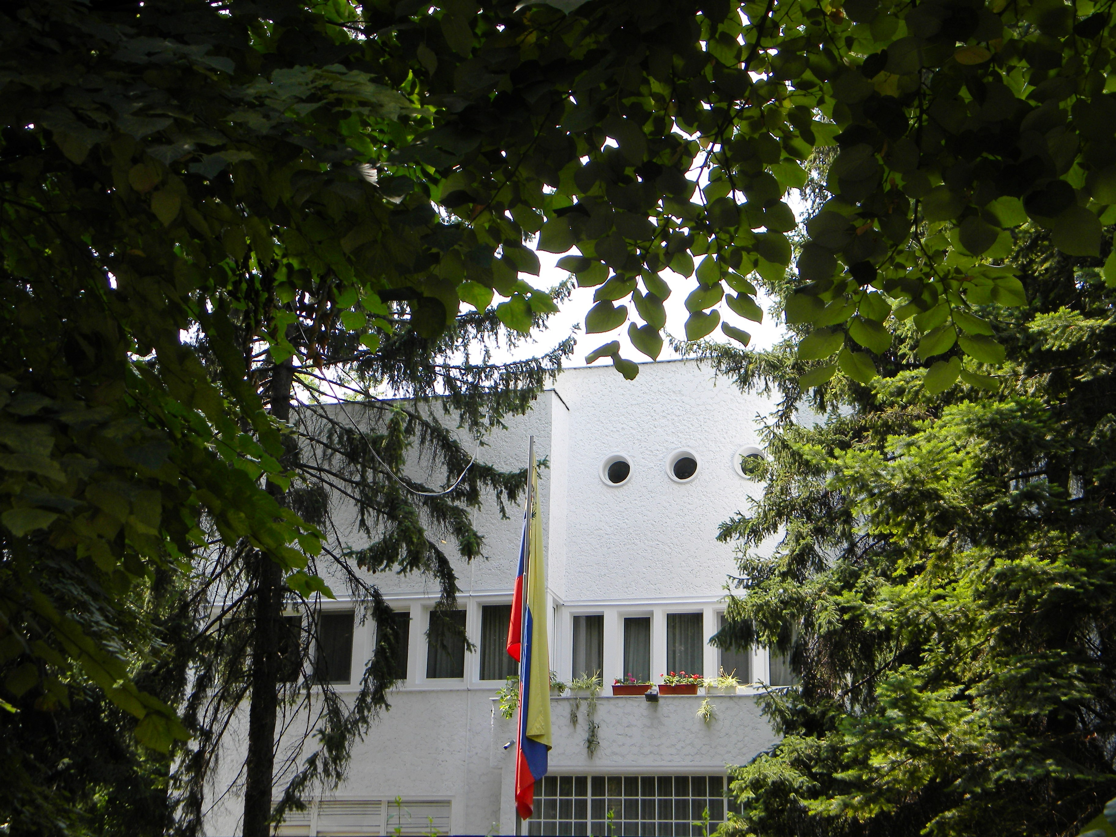 Casa farmacistului Chihaescu, Sos. Kiseleff nr. 49, Bucuresti sect. 1